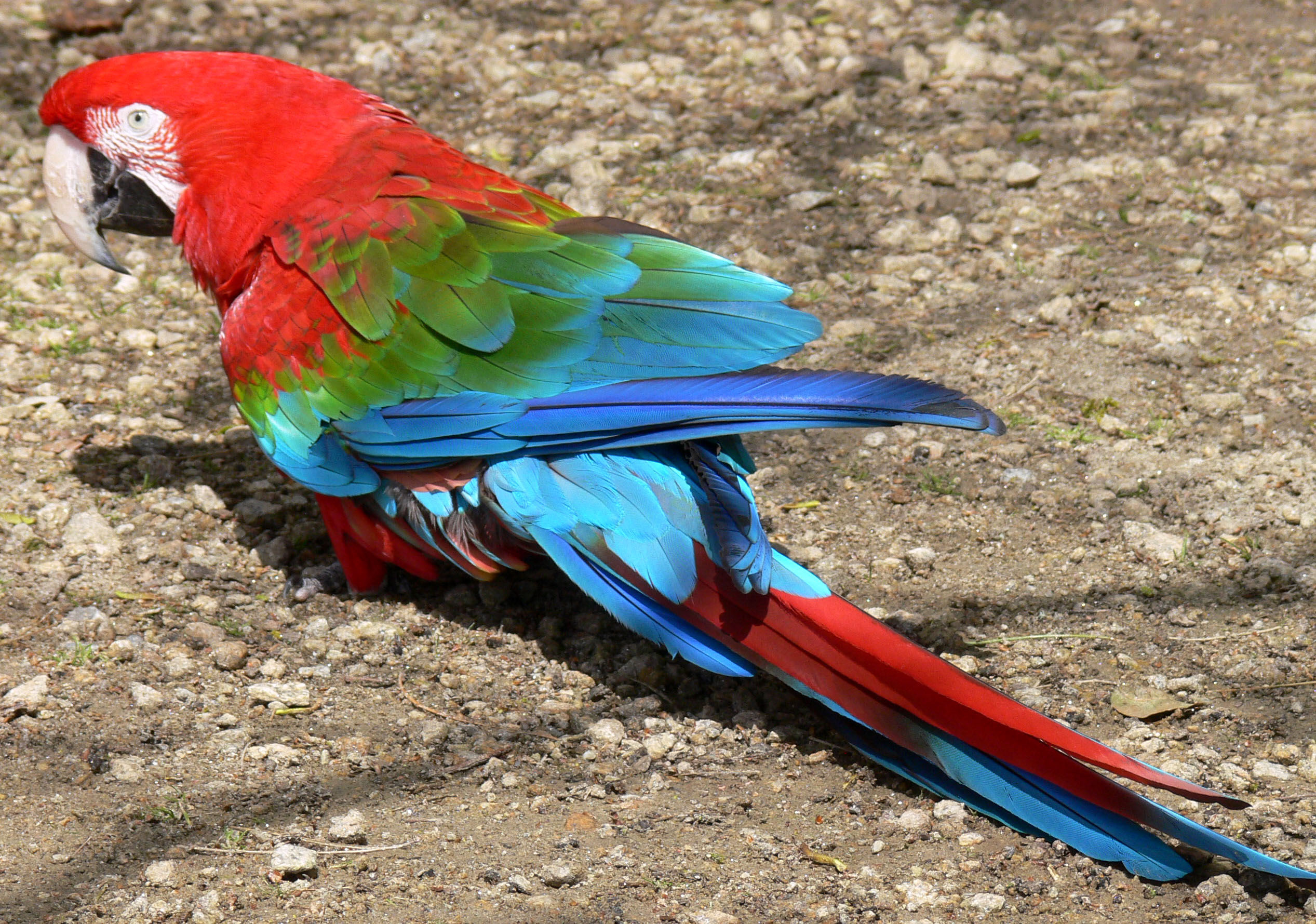 Perroquet Ara (Ara chloropterus), issu de parents élevés en captivité, et vivant dans le parc zoologique de Branferé, Bretagne sud (Morbihan).